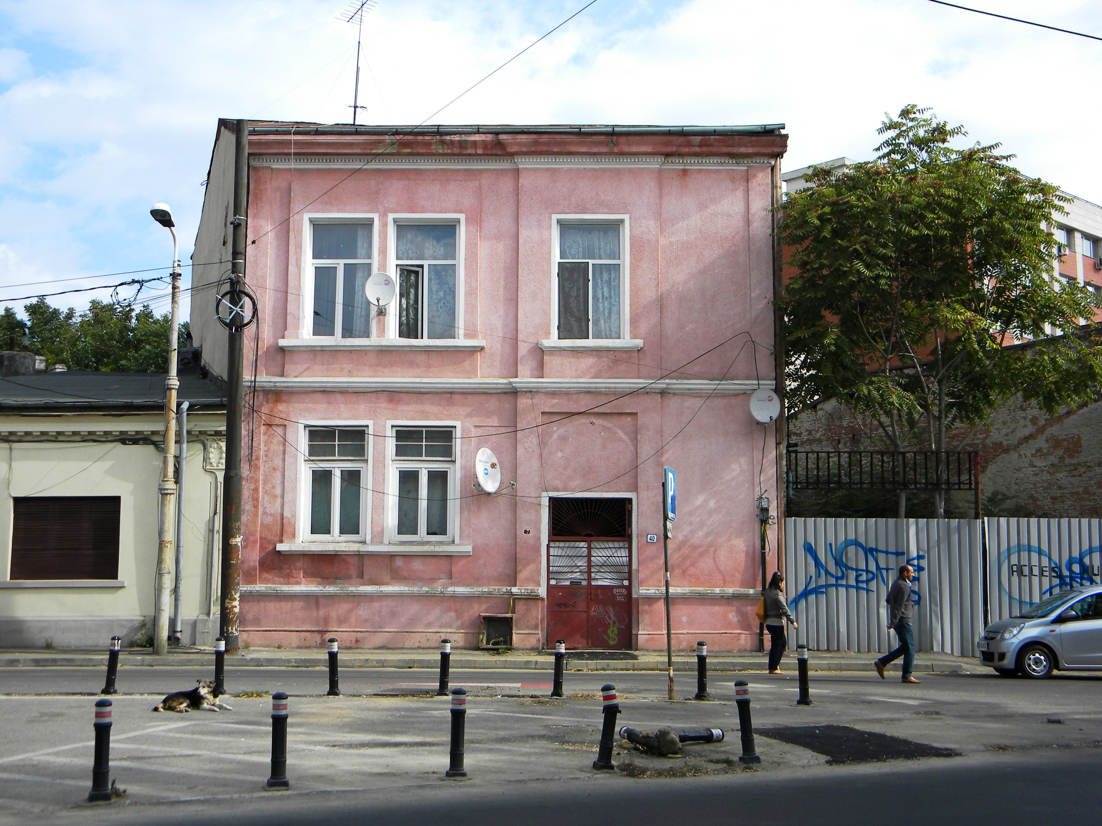 Bucuresti, Romania, Casa pe Calea Grivitei nr. 40, sect. 1